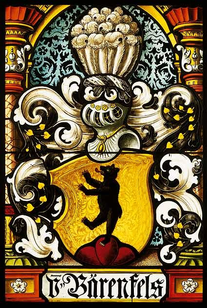 Wappen derer von Bärenfels zu Basel, zierte ursprünglich die Chorfenster der Barfüsserkirche; das heraldische Glasbild der seit etwa 1294 in Basel beheimateten Familie von Bärenfels ist in Komposition und Helmschmuck eine Nachbildung der 1533 datierten Wappenscheibe des Adelberg von Bärenfels im Rathaus zu Rheinfelden